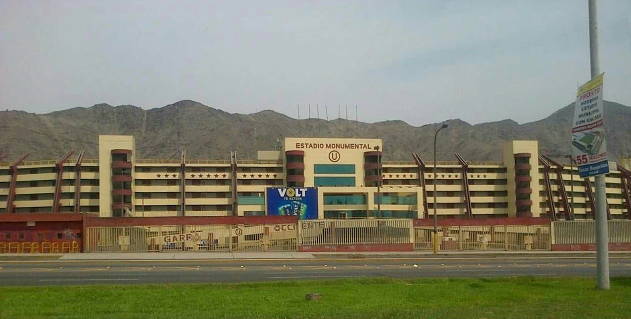 Estadio Monumental U, vista desde la av. Javier Prado